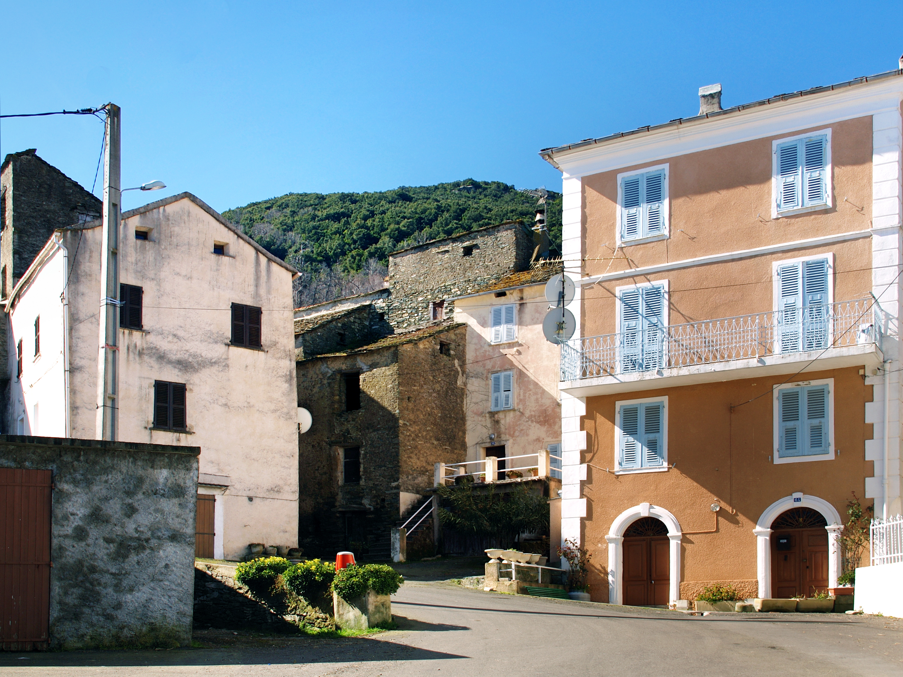 Campile, Castagniccia (Corse) - Place du village